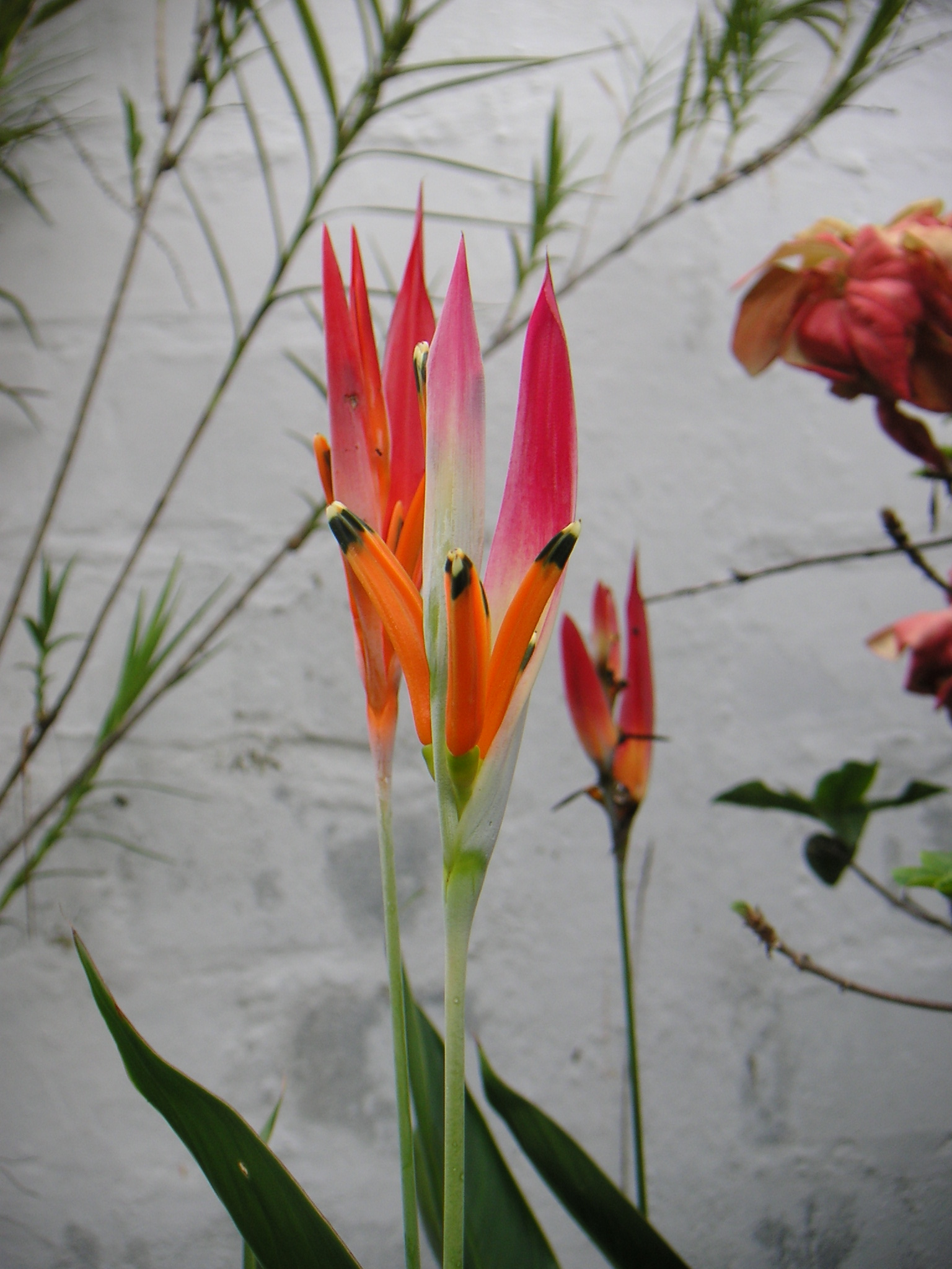 Heliconia psittacorum, Heliconiaceae, Cali / Kolumbien